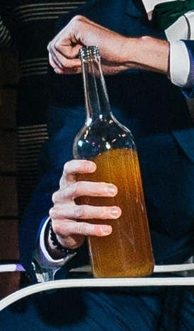 Jest to zdjęcie produktu opisywanego w artykule: Miodula